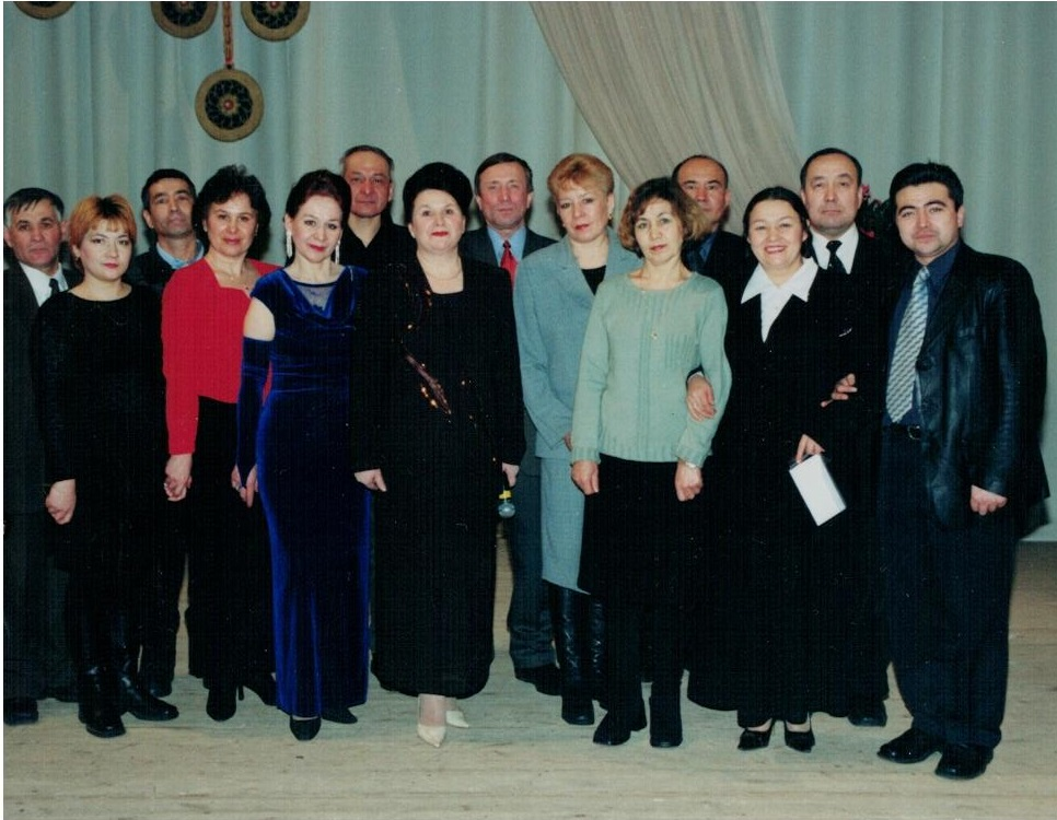 Башҡорт дәүләт филармонияһы тамашаһынан һуң